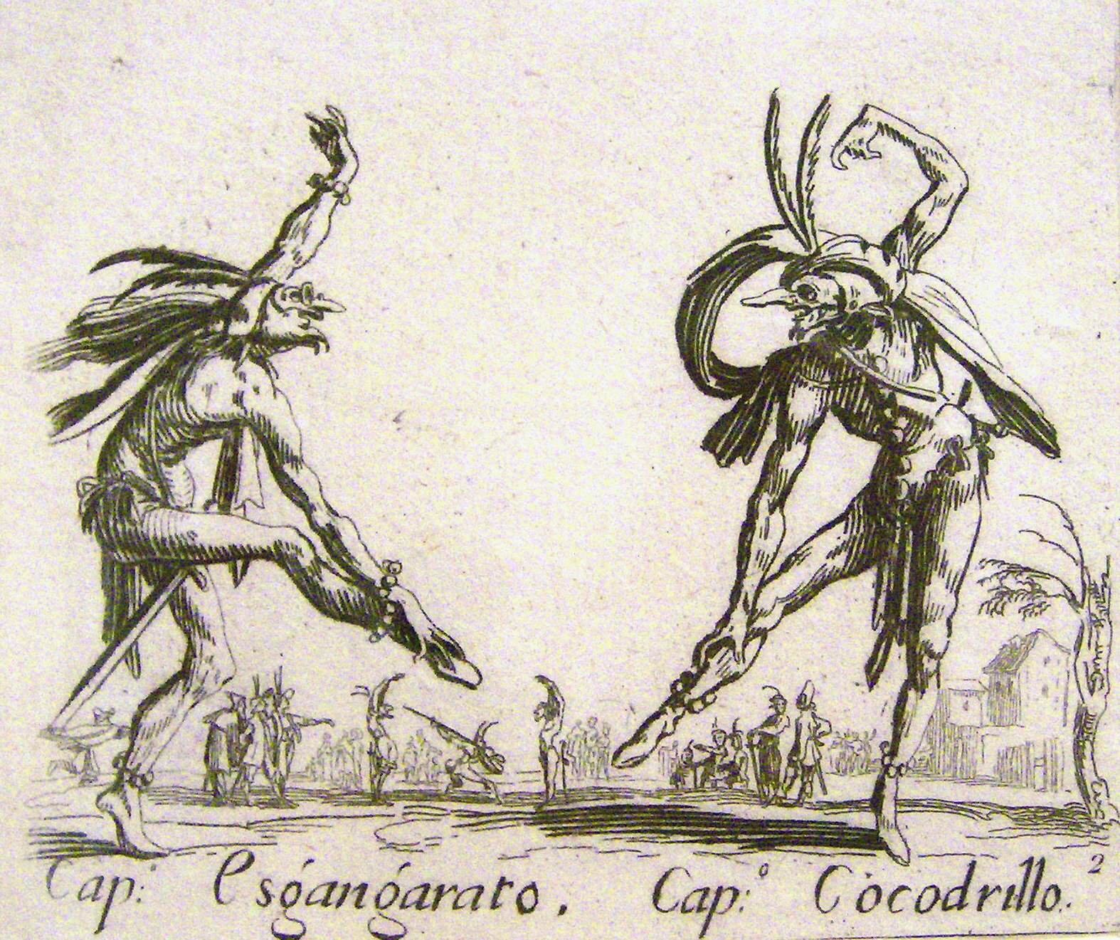 Commedia dell'arte, Radierung von Jacques Callot